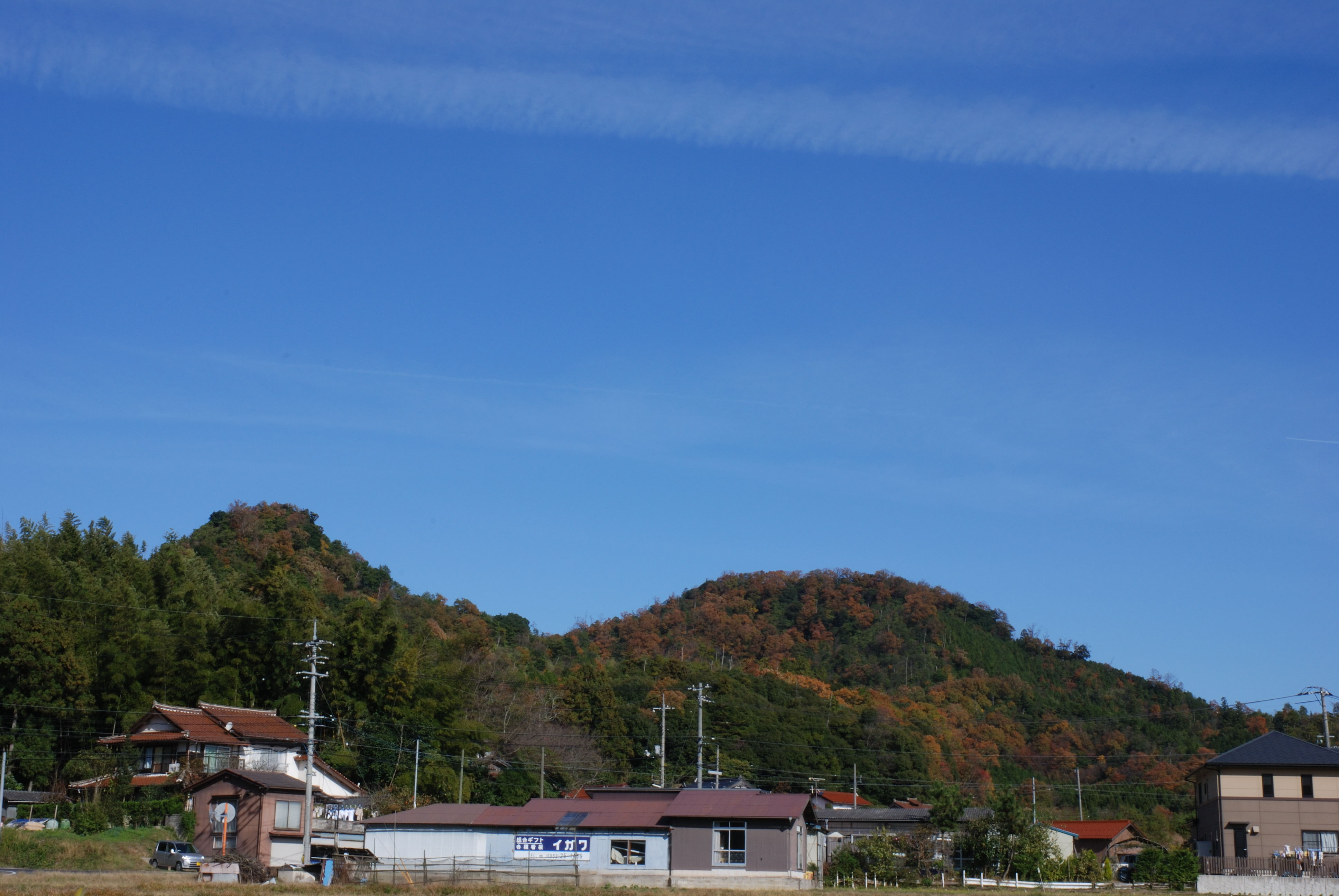 Shiraga Castle